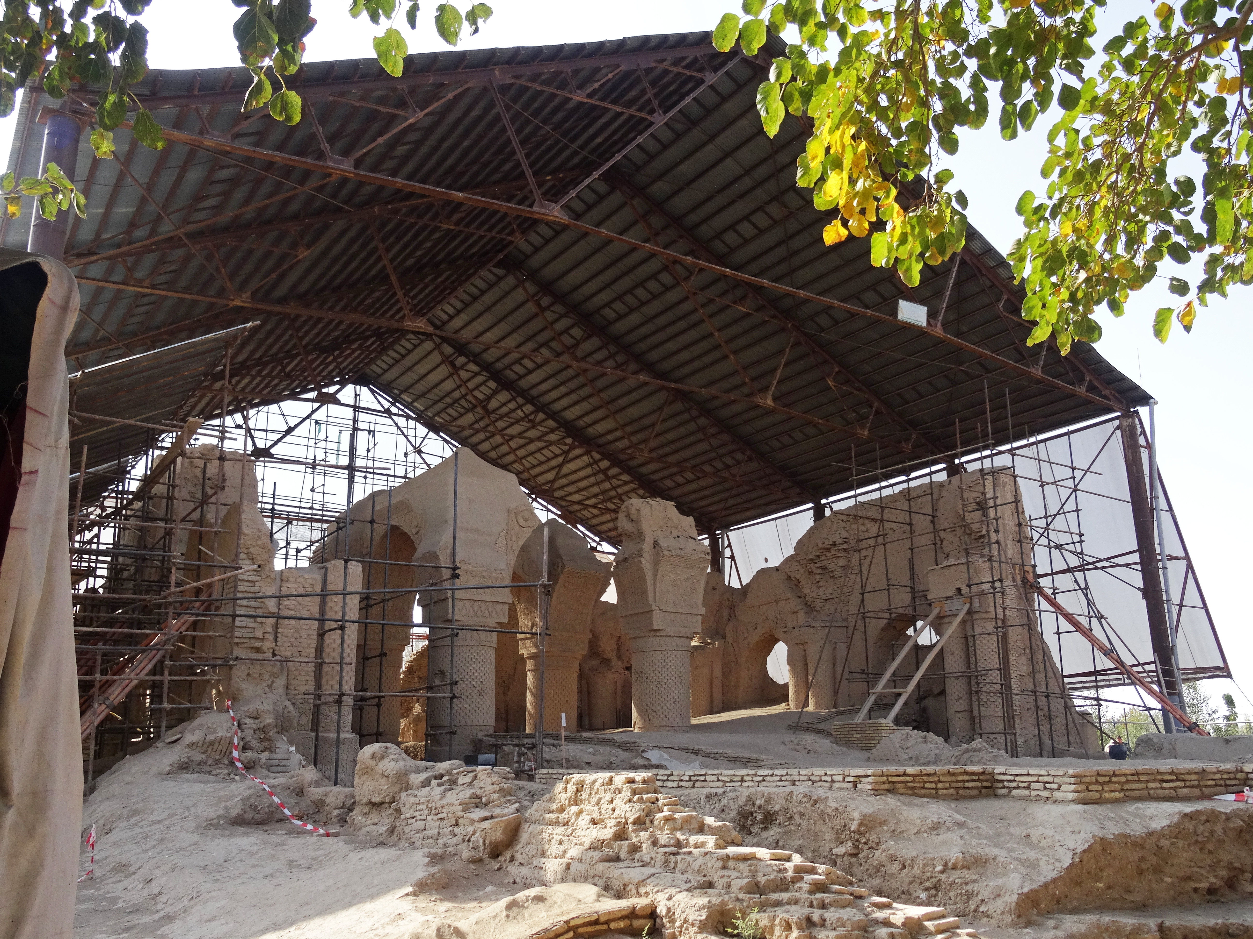 Afghanistan: Überdachte Ruine Tacht-e Rostam bei Balch